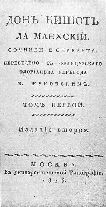 Primeras ediciones en lenguas europeas de Don Quijote de la Mancha (ruso [1815]).